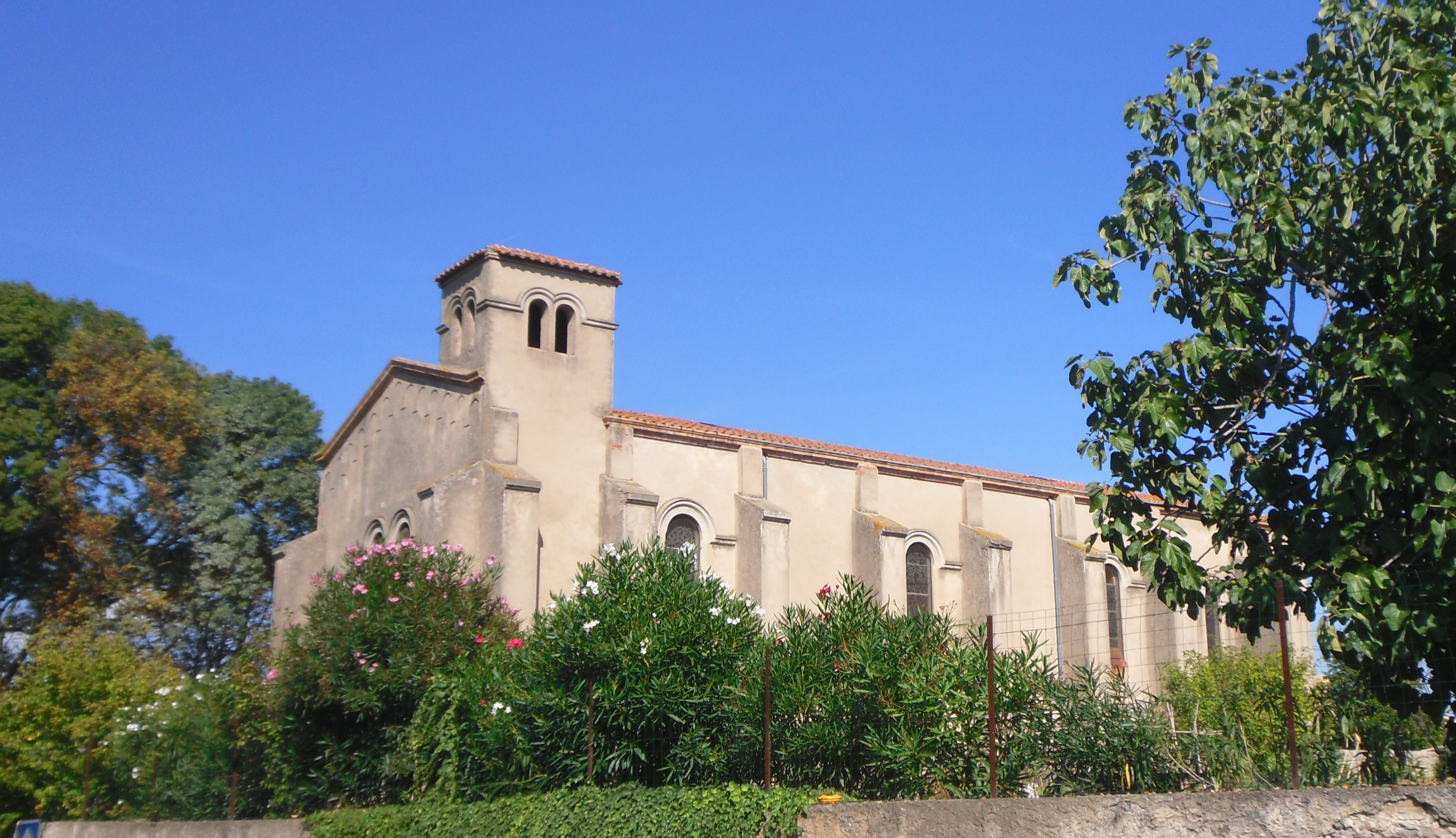 Eglise de Roquecourbe-Minervois